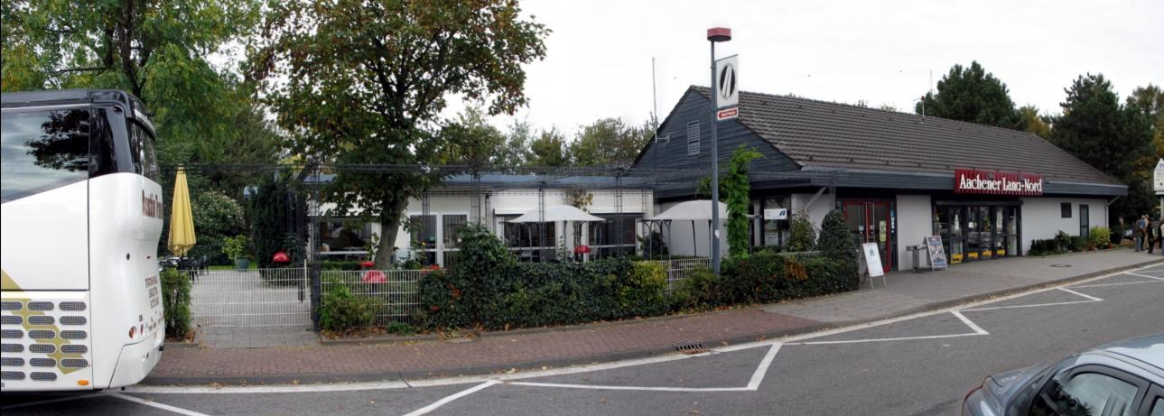 Raststätte Aachener Land Nord in Eschweiler